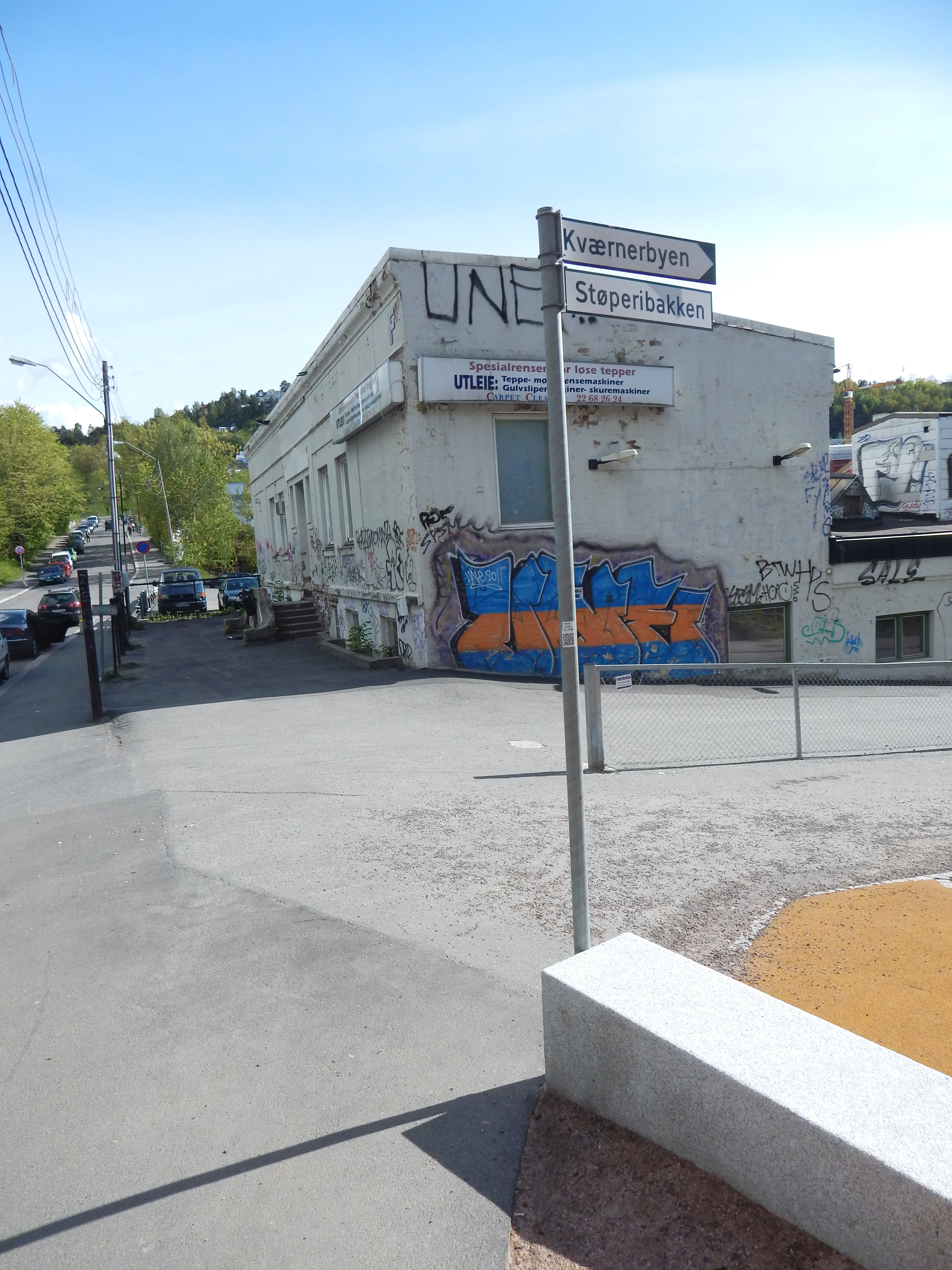 Støperibakken tar av fra Enebakkveien.